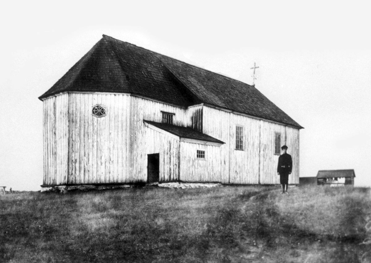 Беларуская (тарашкевіца): Рось (Roś). Царква